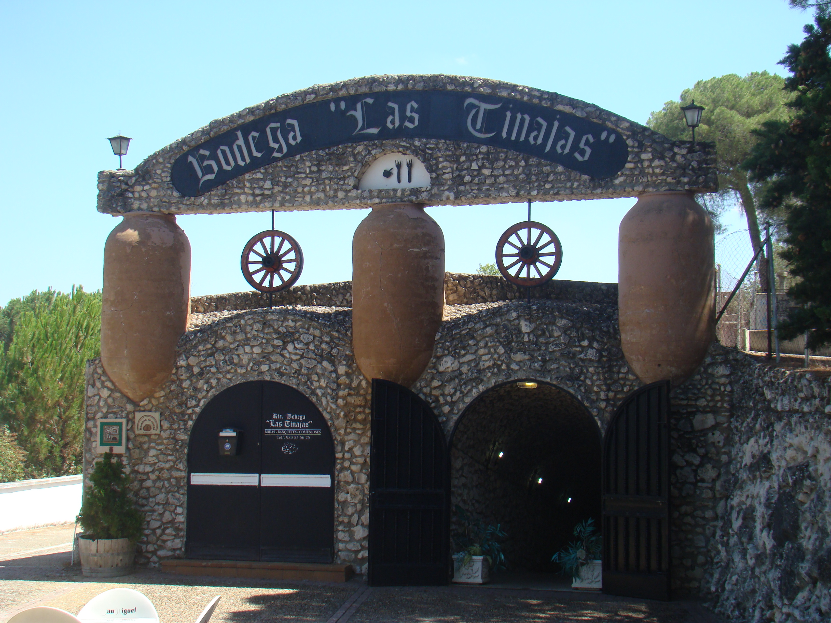 En el término de Villanueva de Duero (Valladolid, España) está este merendero llamado Las Tinajas. Ocupa el mismo lugar que ocuparon las antiguas bodegas del monasterio de Aniago.